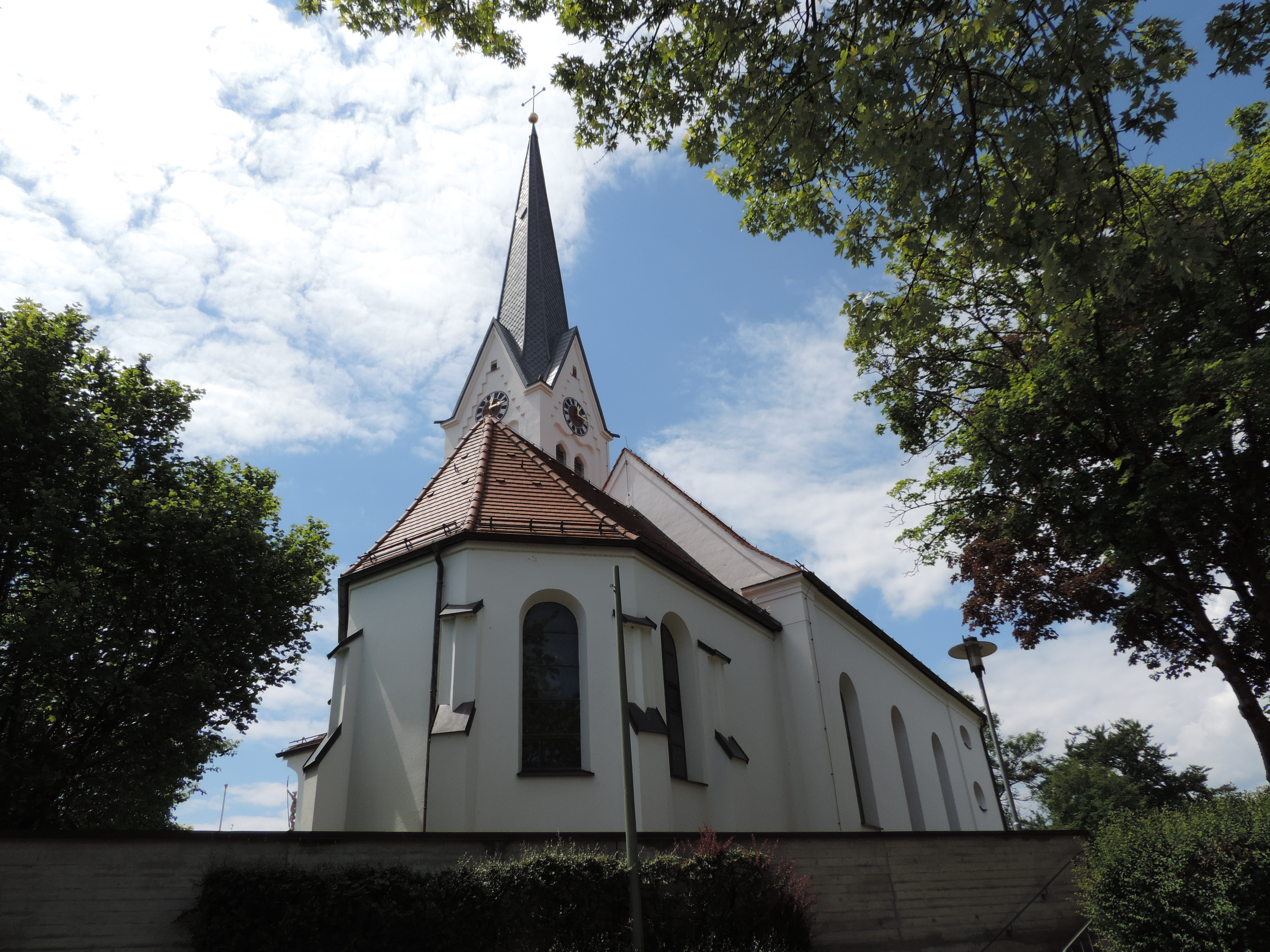 Nordwestansicht